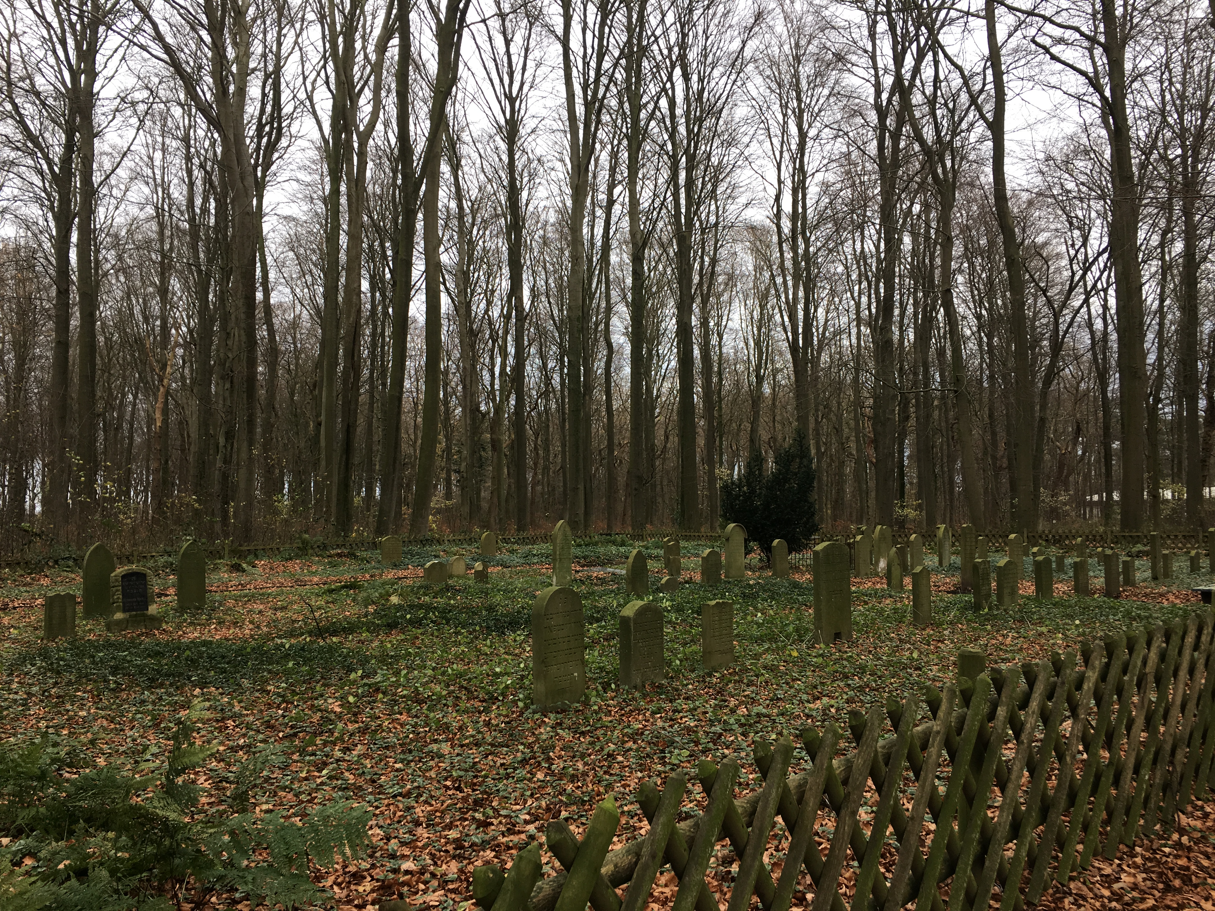 Blick över’n Jöödschen Karkhoff Cuxhoben